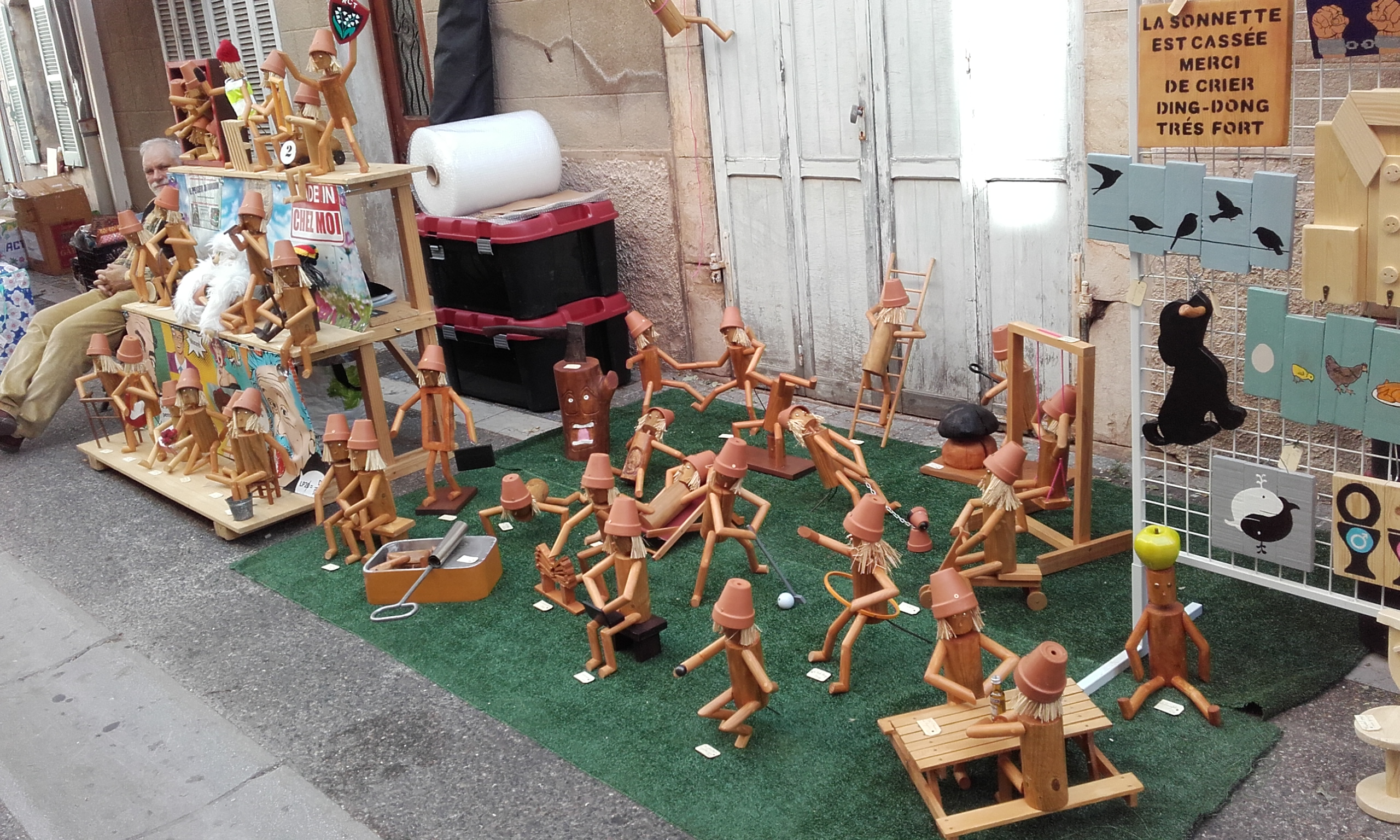 Var, Besse-sur-Issole, la journée du 18ème siècle, c'est aussi un marché artisanal qui illustre des savoirs faire (ici des jouets en bois), et des animations diverses : théâtre de rue, musique et combats épiques.